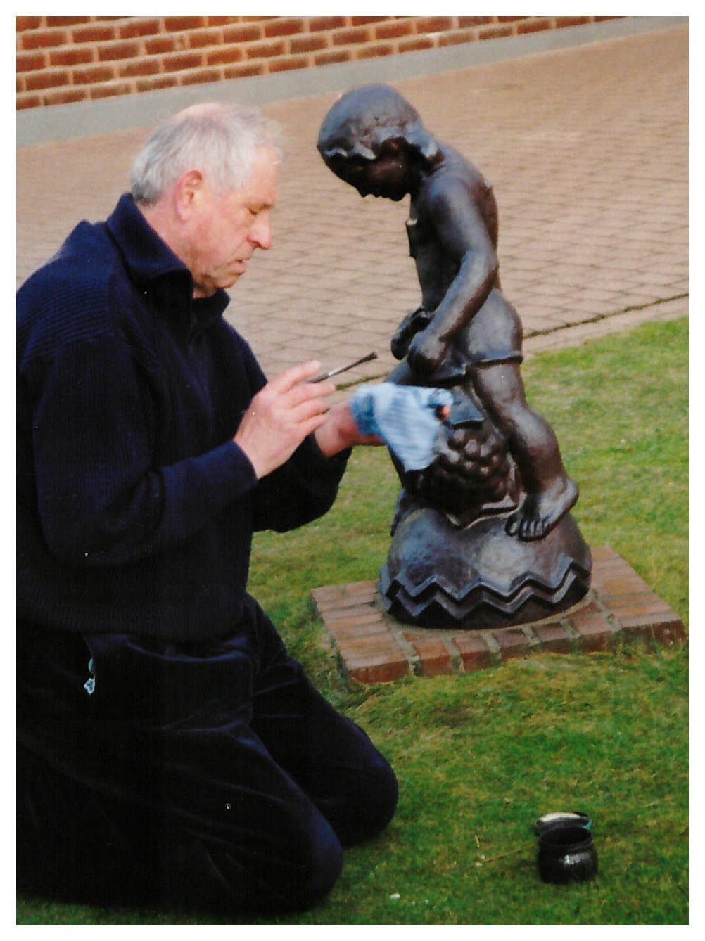 Homuth restauriert Statuen für die Kinderklinik in Nebel auf Amrum